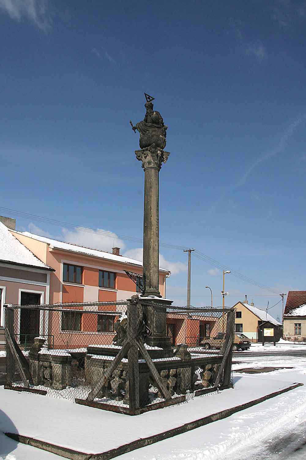 Choltice, okres Pardubice. Morový trojiční sloup na náměstí Sv. Trojice.